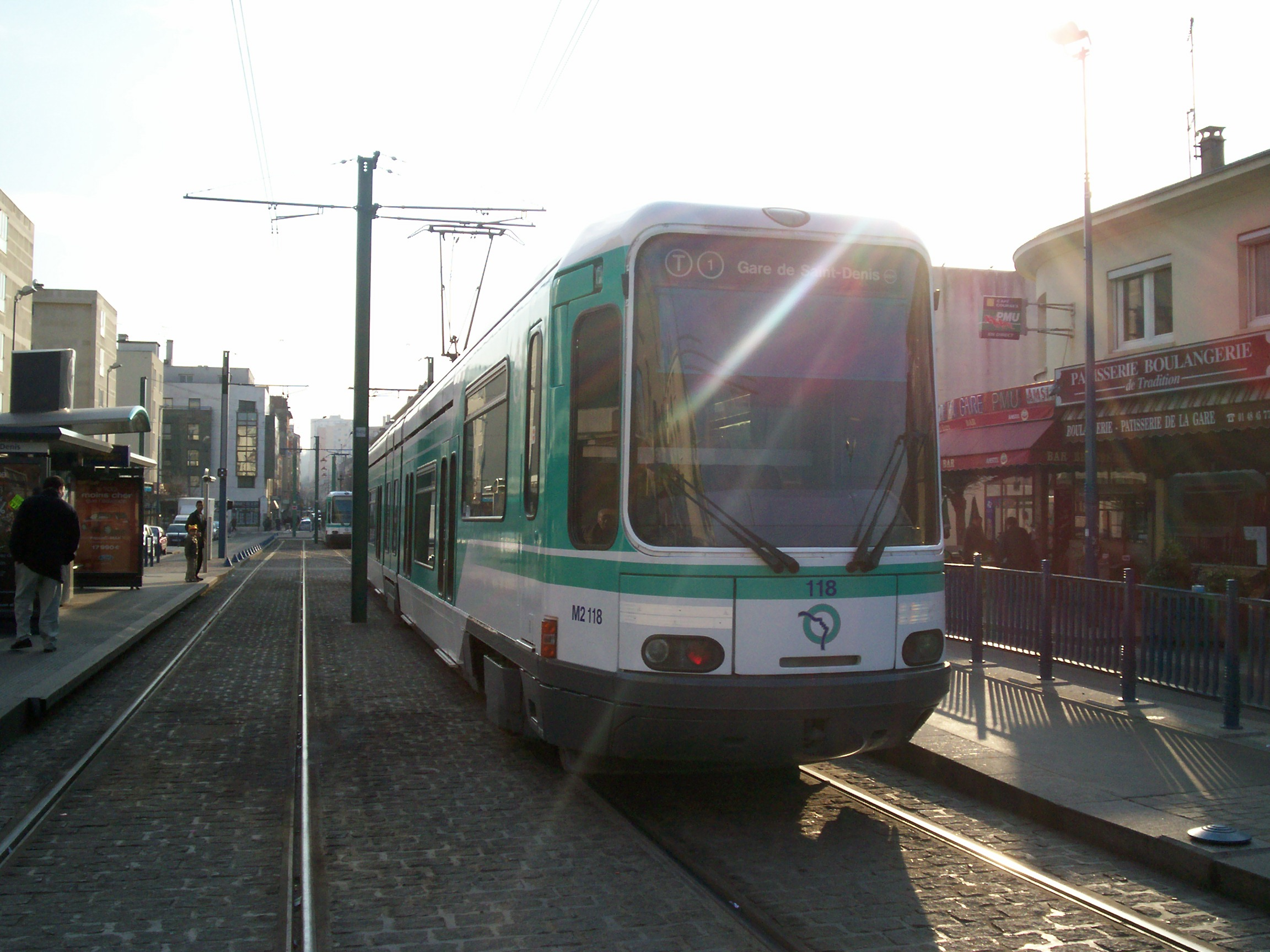 T1 à Noisy-le-Sec RER